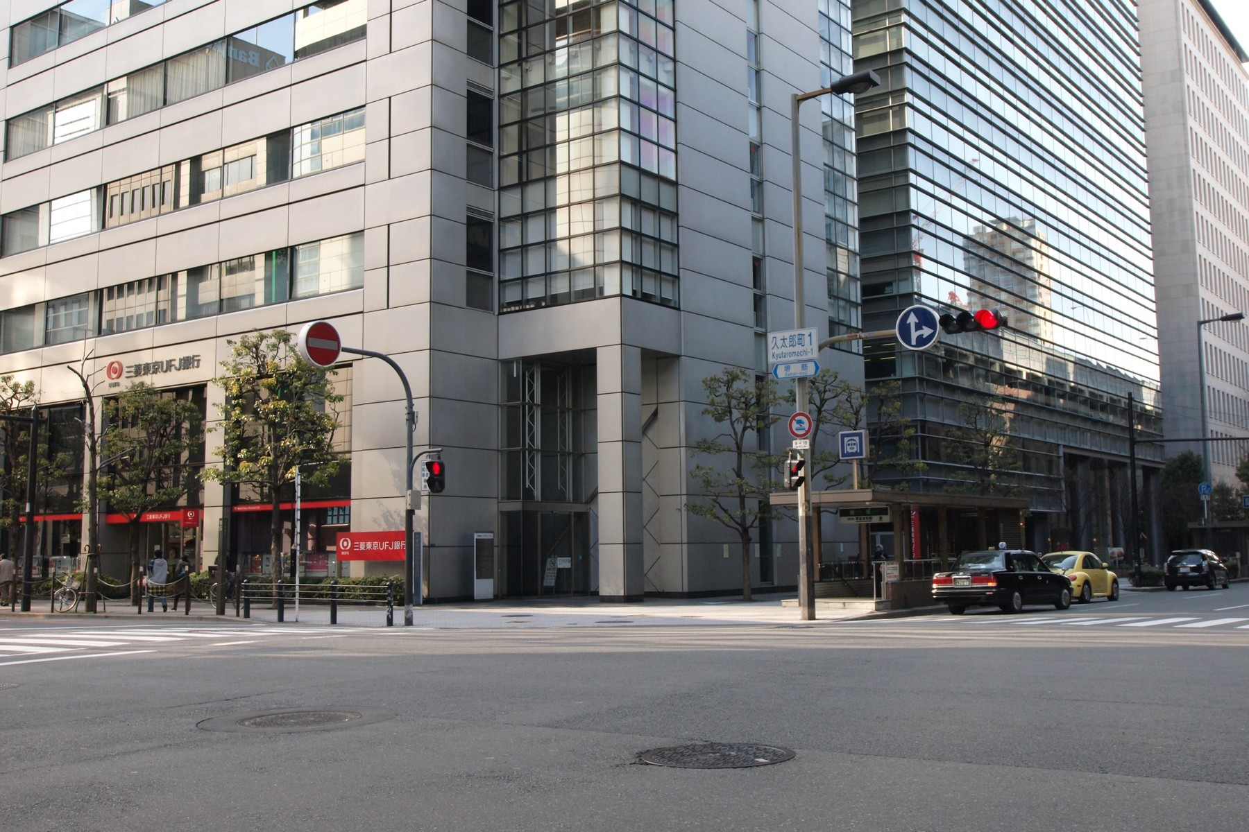 大阪市営地下鉄 中央線/堺筋線 堺筋本町駅10号出入口付近 所在地：大阪府大阪市中央区船場中央1-4-16